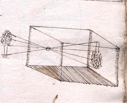 Camera obscura (illustration)